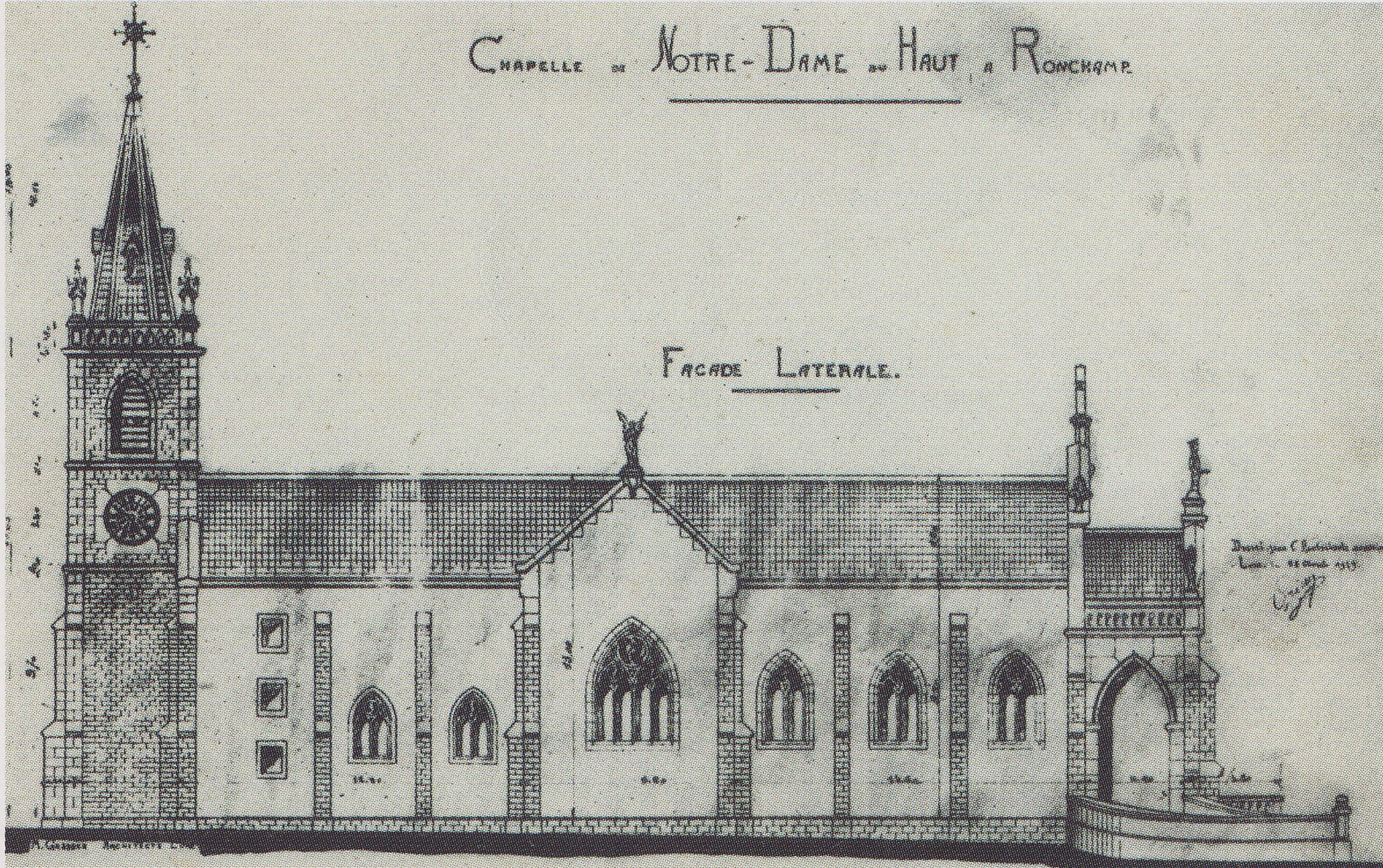 Risszeichnung der Kapelle Notre Dame du Haut, die 1922 neu errichtet wurde